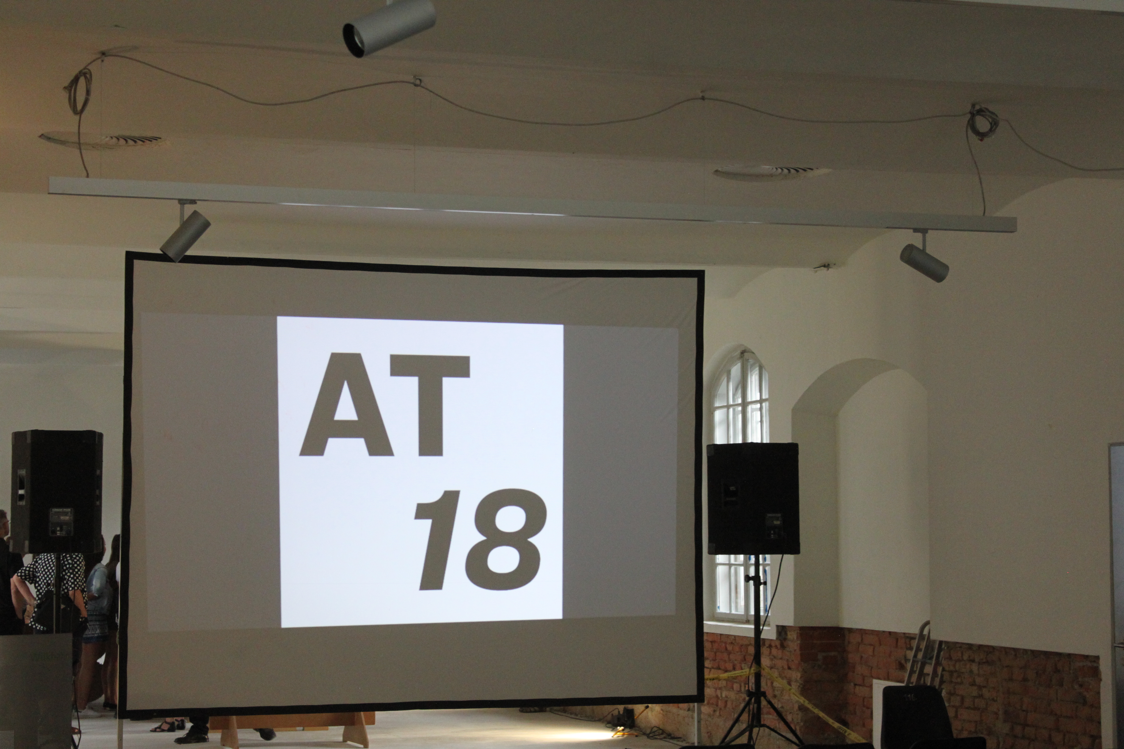 Architekturtage 2018 im Architekturhaus Salzburg, in Restaurierung, ehemalige Stallung der ehemaligen Riedenburgkaserne, Sinnhubstraße 3